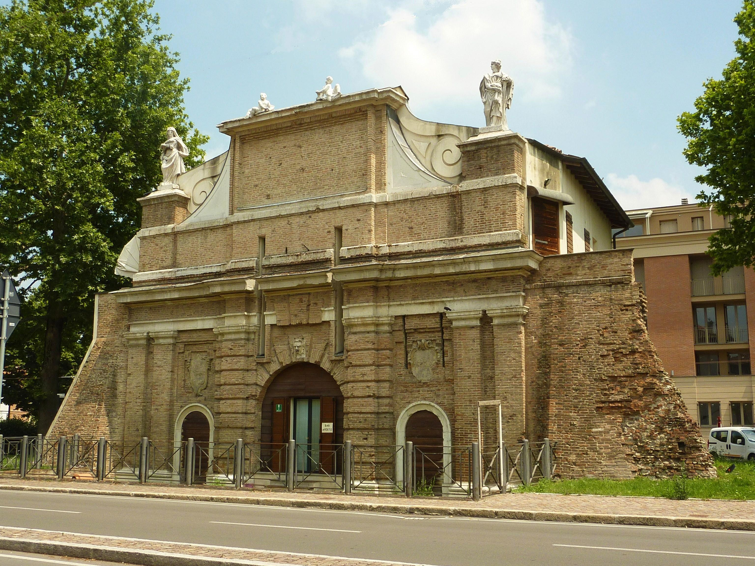 Posta San Francesco a Parma, sede della Famija Pramzana.